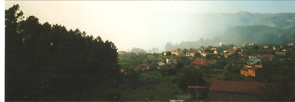 Vista panorâmica de São João da Serra. Ao fundo vê-se o fumo proveniente de um incêndio que afectou a região adjacente.